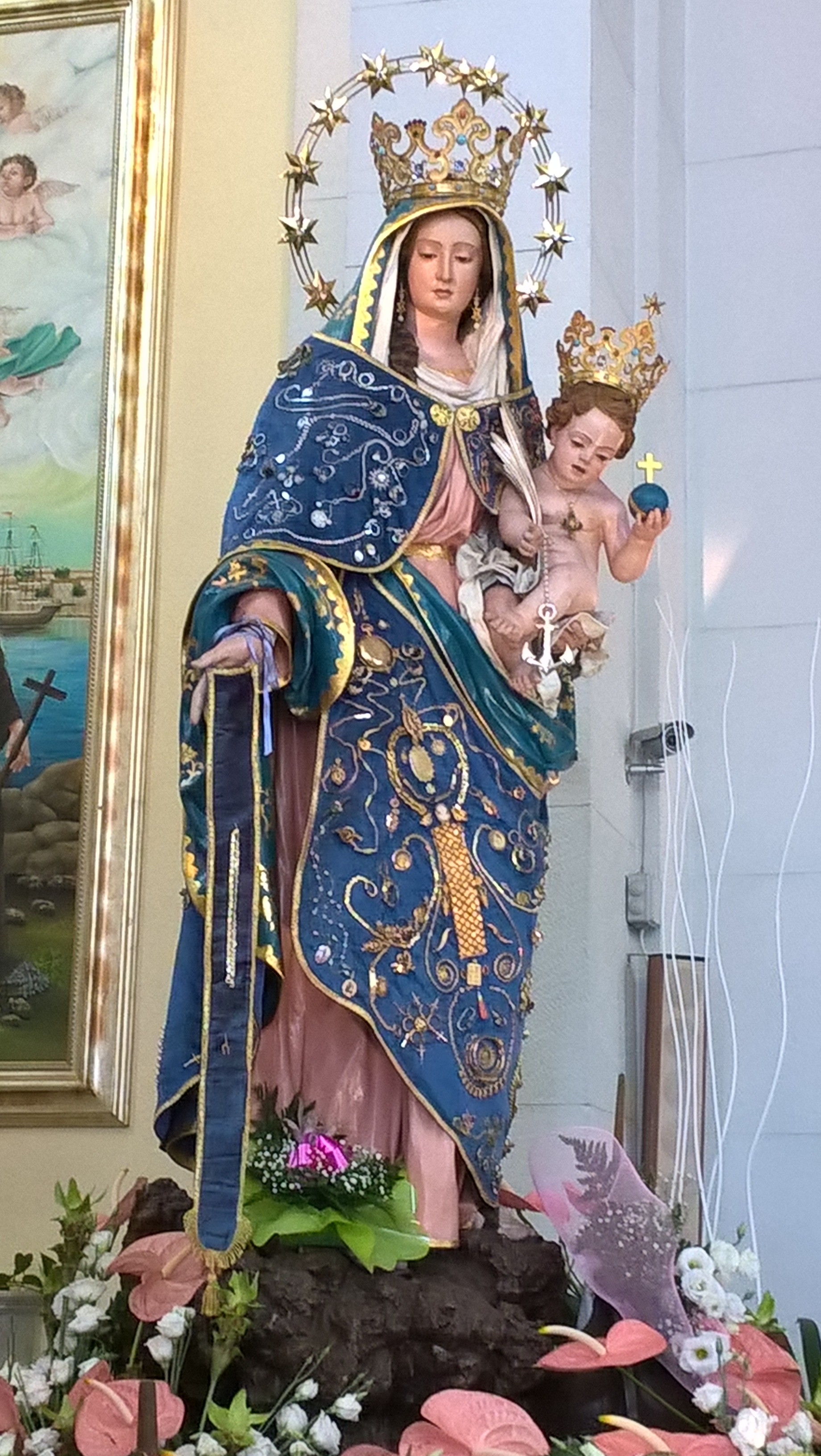 Statua Madonna Porto Salvo XIX sec